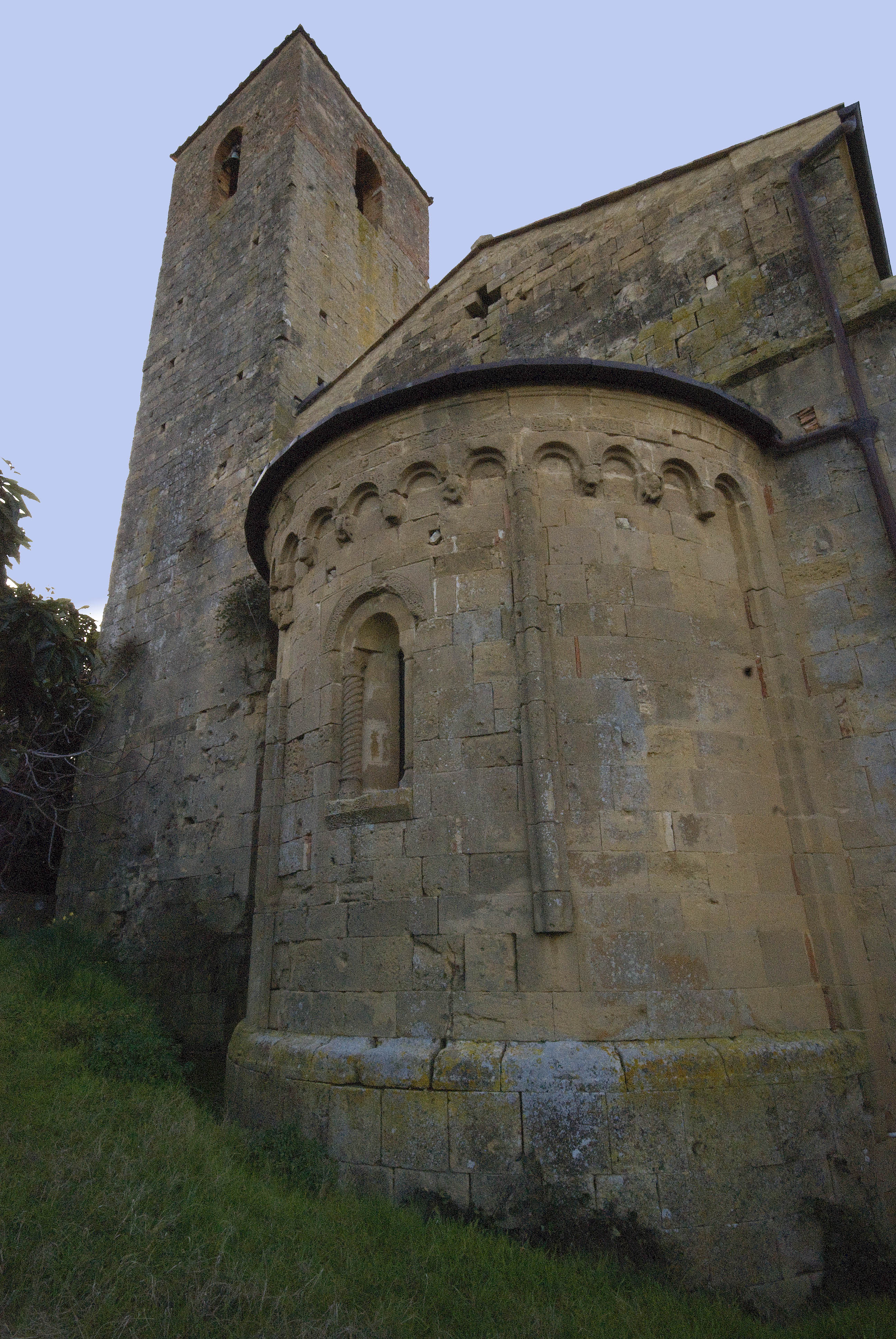 Vista dell'abside della chiesa di San Pietro a Cedda (Poggibonsi)